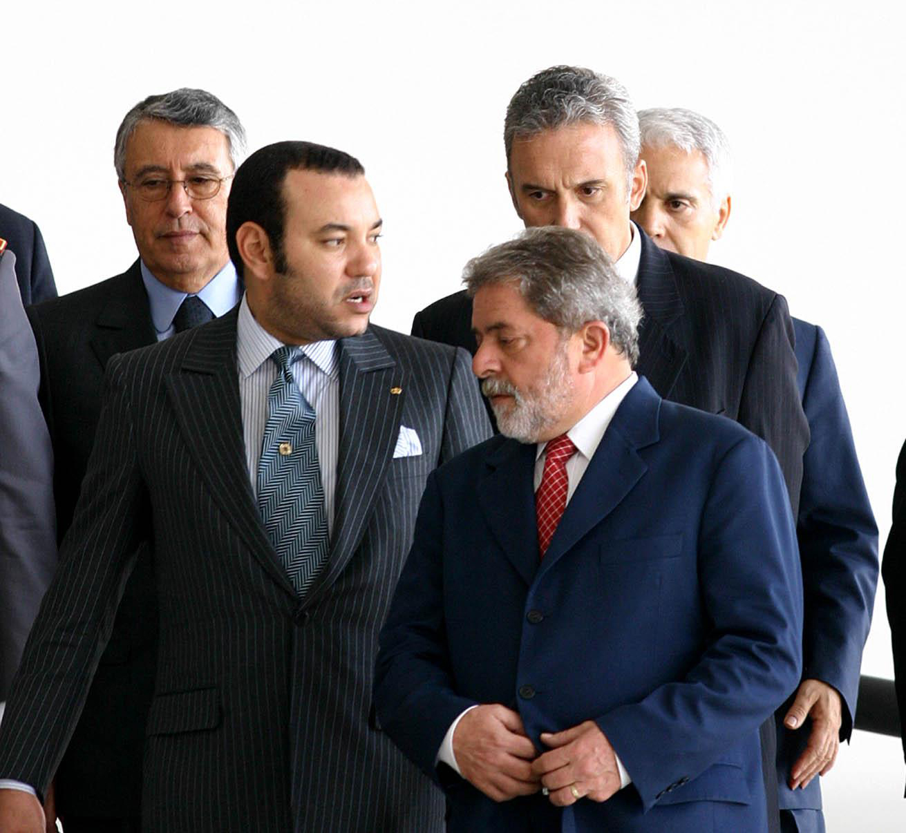 O presidente Luís Inácio Lula da Silva e o rei do Marrocos Mohammed VI em Brasília.